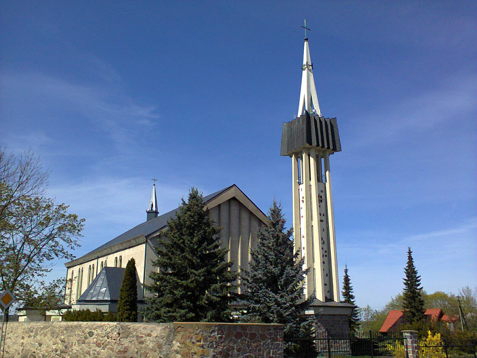 Kościół parafialny pw. św. Anny w Radziłowie